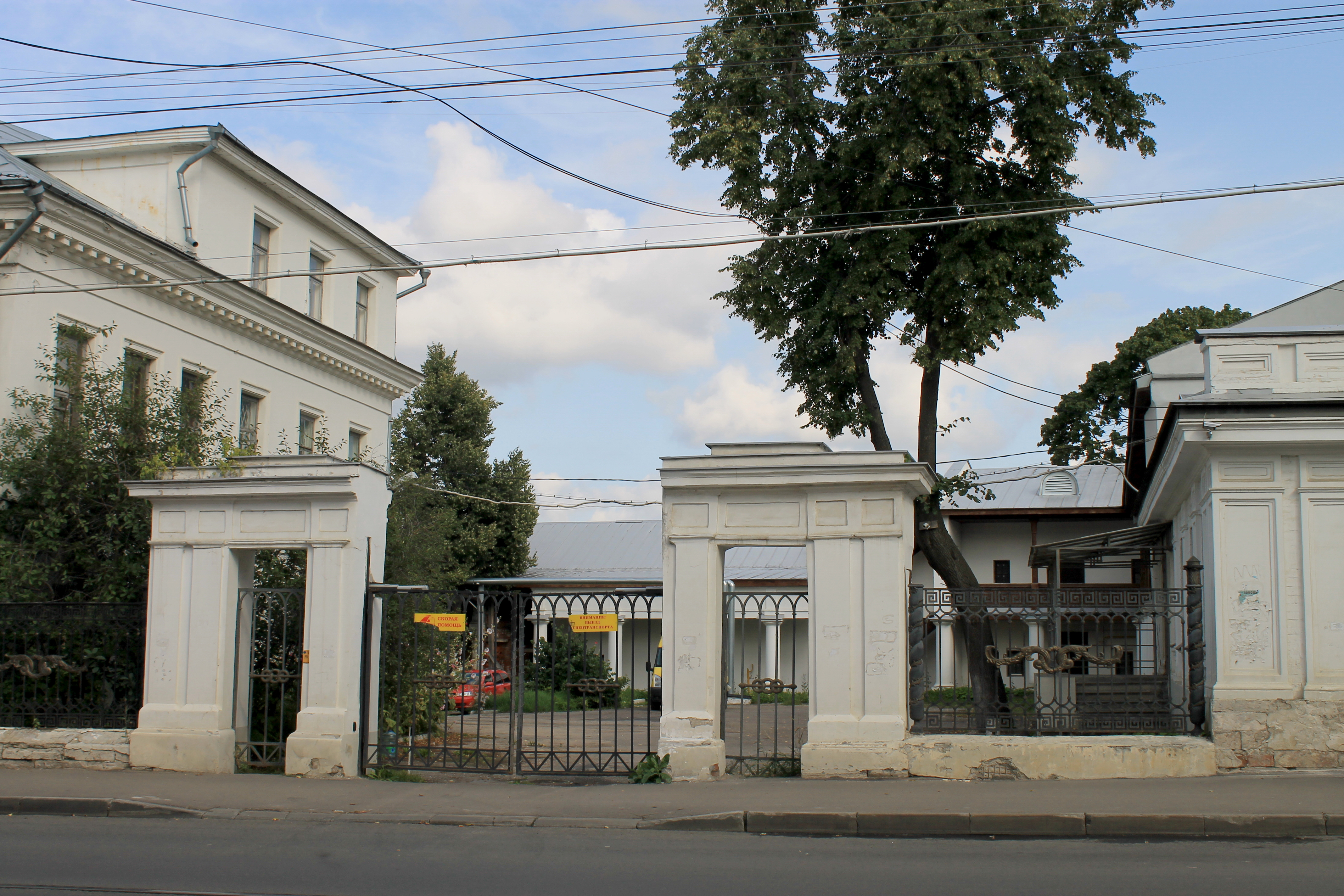 Ограда: улица Ильинская, 56, Нижний Новгород, Нижегородская область